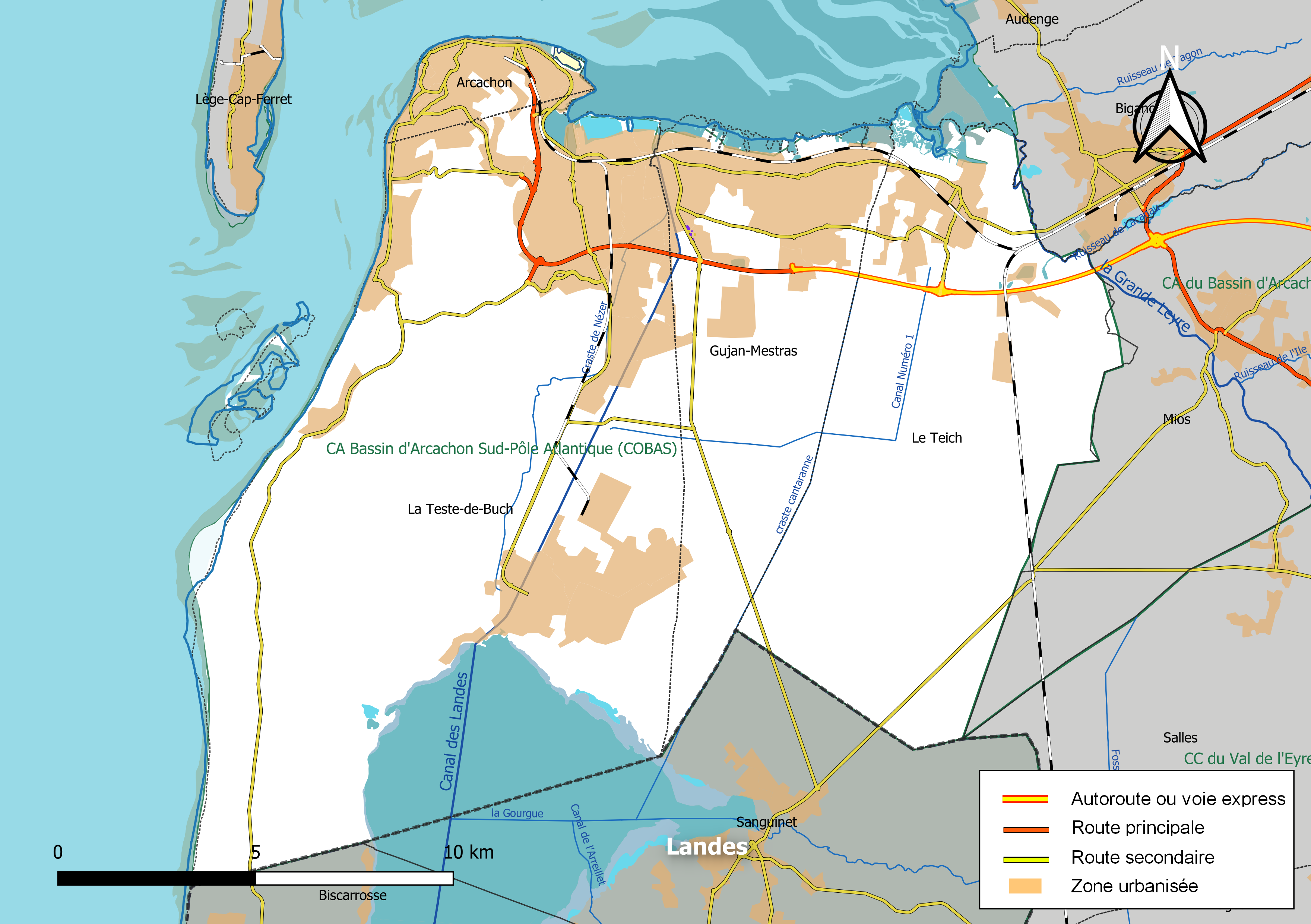 Carte géographique de la Communauté d'agglomération Bassin d'Arcachon Sud-Pôle Atlantique, département de la Gironde, France. Composition au 1er janvier 2019.